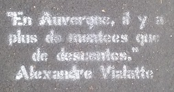 "En Auvergne, il y a plus de montées que de descentes" citation d'Alexandre Vialatte, Graph'/Street art éphémère, Clermont-Ferrand.